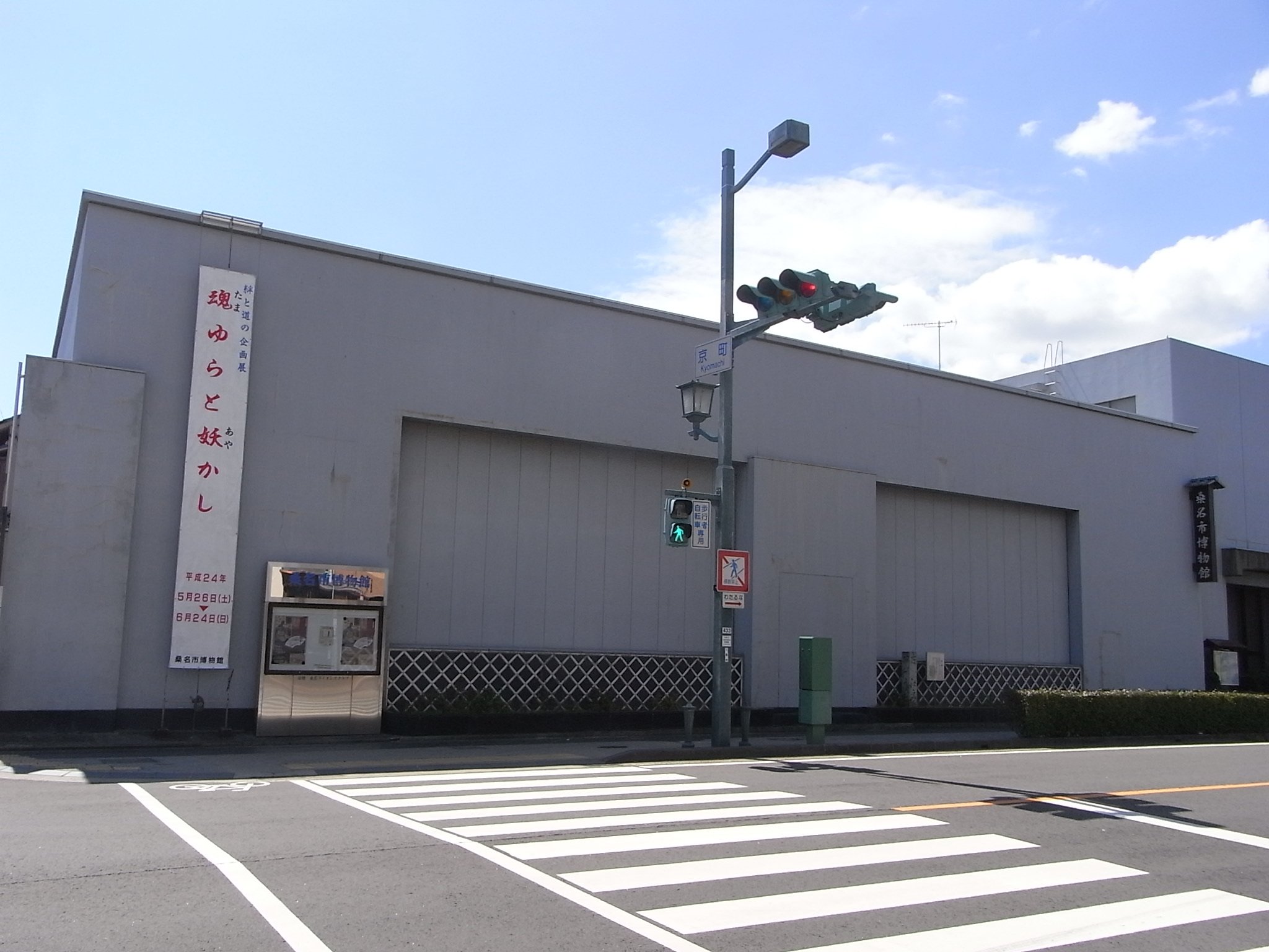 桑名市博物館(三重県桑名市京町３７−１)